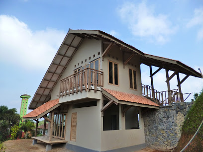 Pada zaman dahulu lokasi ini adalah sebuah tebing yang sekarang menjadi bangunan-bangunan ada Masjid, Rumah untuk santri, Aula dan Kelas belajar.